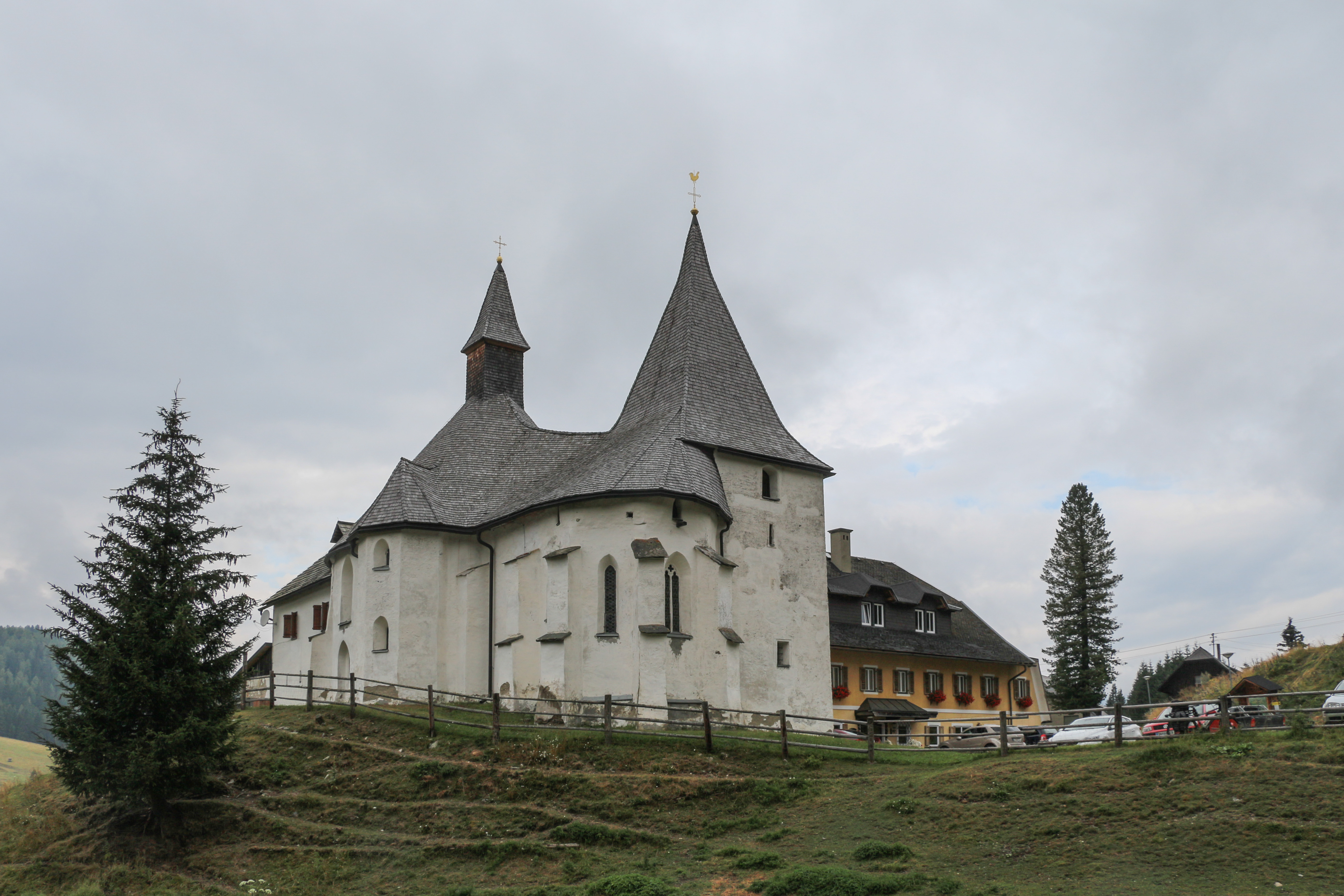 Filialkirche heiliger Johannes der Täufer (Flattnitz) - Glödnitz, Kärnten